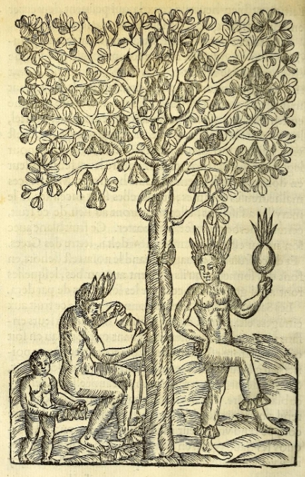 Ahouaï (Thevetia ahouai) gravure